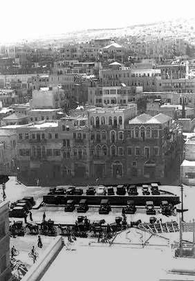 Hamra square - Haifa. it was the transportation hub of Haifa and the gate to Kasbah כיכר חמרה הייתה כיכר בצורת מלבן בעיר התחתית של חיפה תחילתה בבתקופה העות'מאנית. הכיכר התפתחה בצמוד לשער המערבי של "חיפה החדשה" שהייתה בין החומות. הכיכר שימשה כמרכז הפעילות של העיר כיכר חמרה מבט לכוון דרום לכוון ההר. צולם בשנת 1934